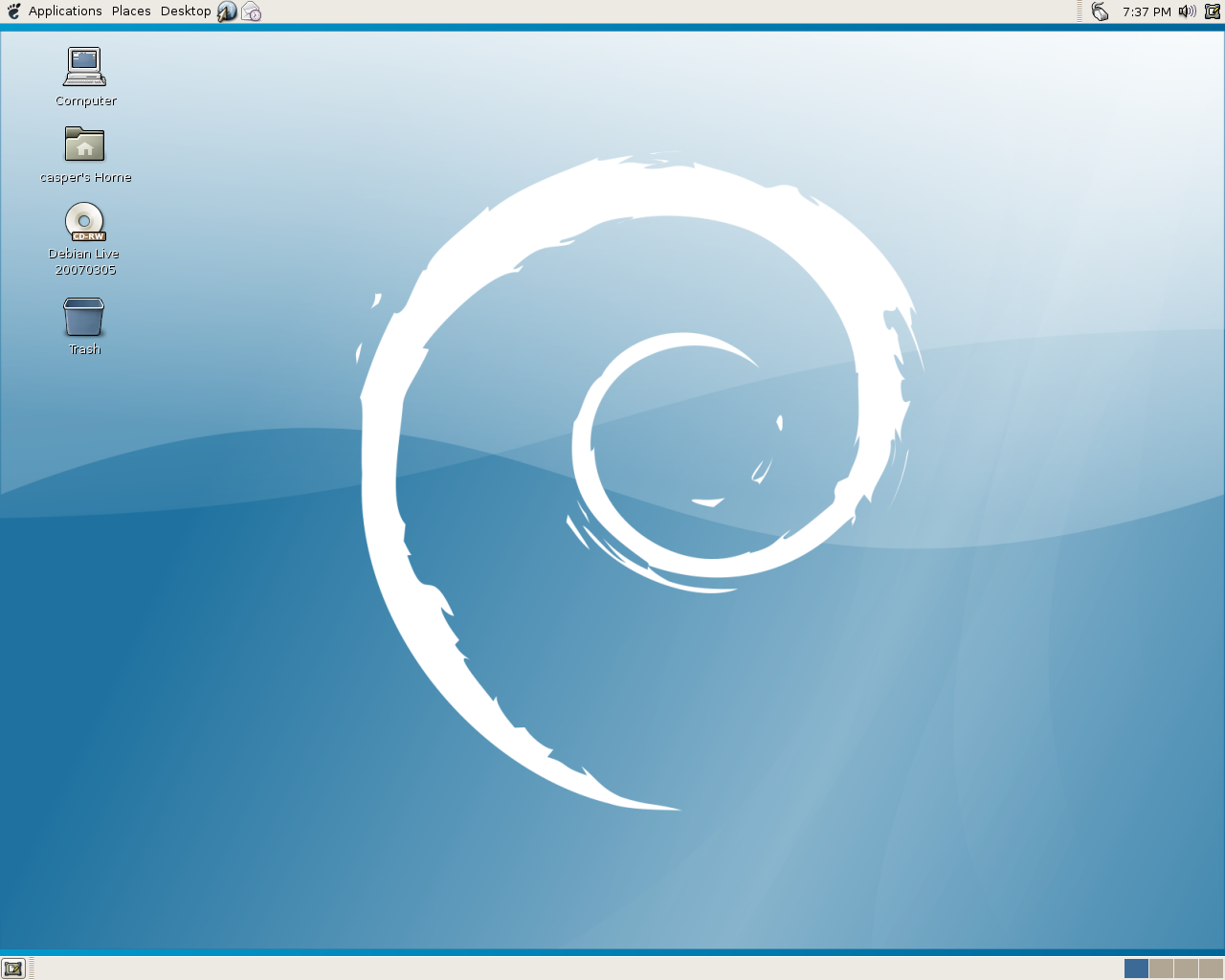 Debian Etch's default GNOME desktop